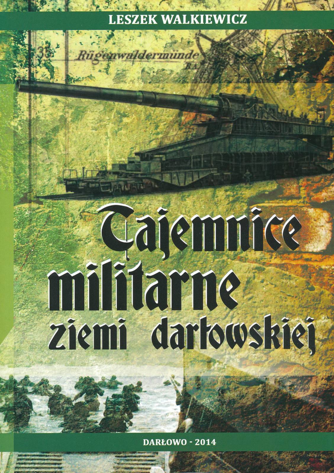 Okładka książki Leszka Walkiewicza "Tajemnice militarne ziemi darłowskiej"